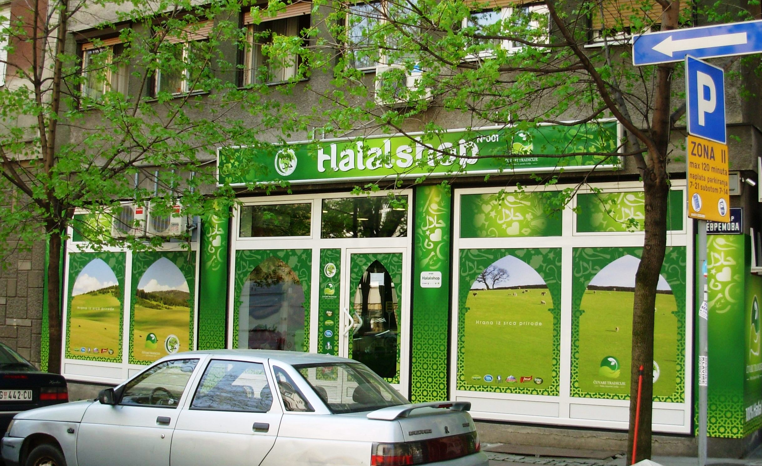 Halal šop u Jevremovoj ulici, Beograd, u neposrednoj blizihi Bajrakli džamije. Slikao Goldfiger